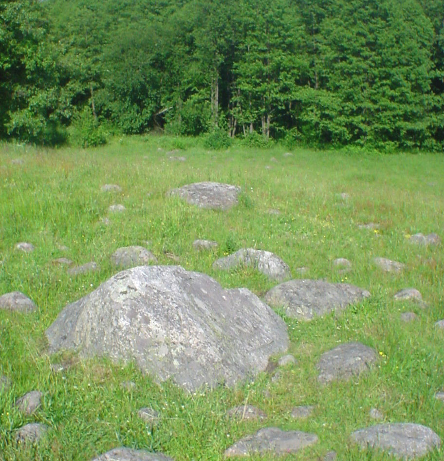 Głazowisko w Bachanowie. Foto: Wikipedysta:Rumun999